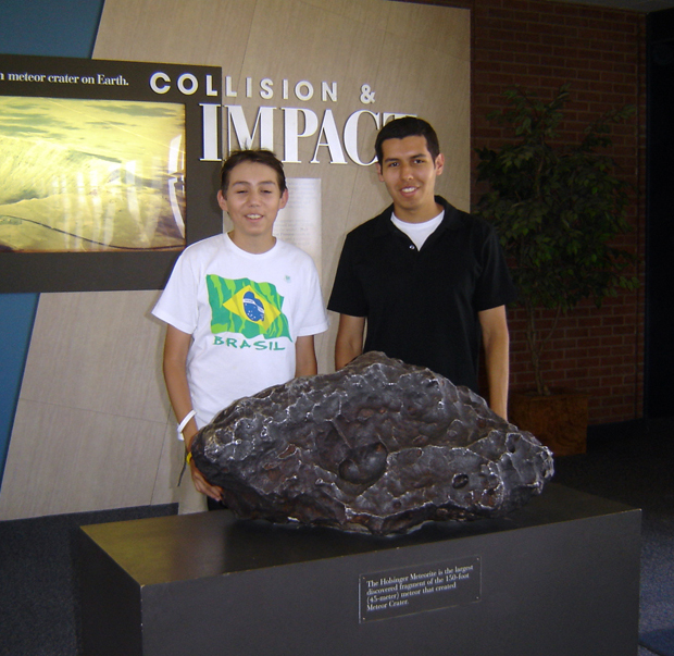 Fragmento del meteorito Barringer, Meteor Crater, Arizona